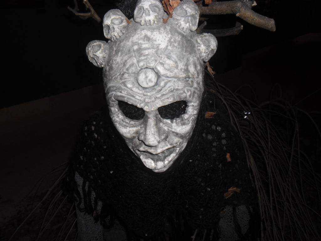 narodni prikaz coprnice (vještice), Etnografski muzej u Zagrebu